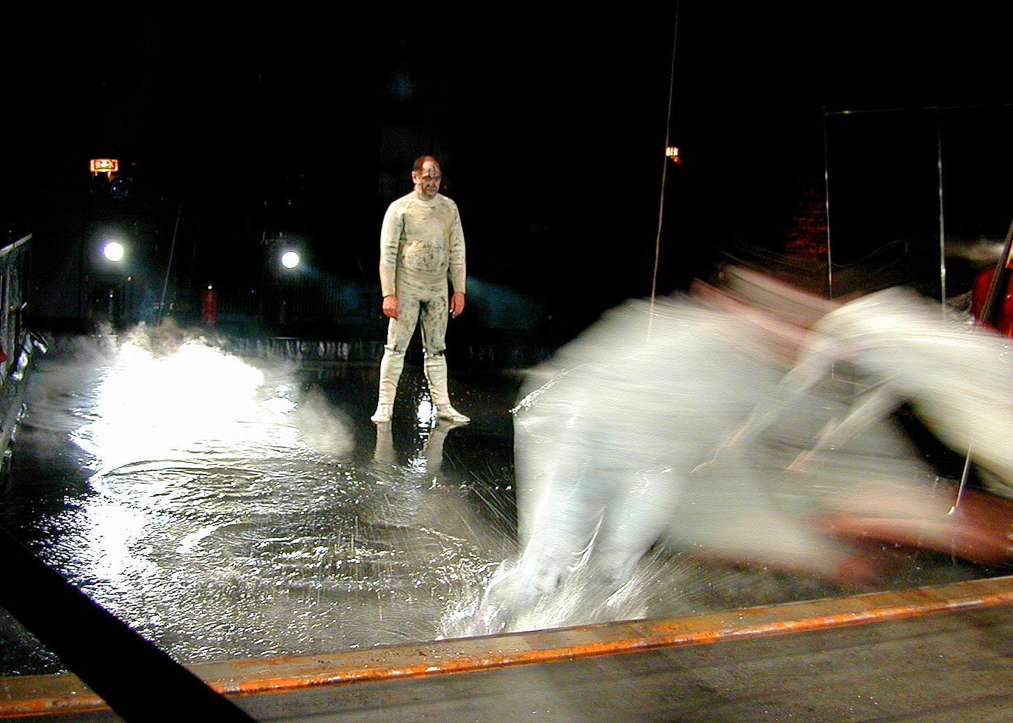 Jürgen Haug in Bauchgeburt von Rolf Kemnitzer, Regie: Urs Odermatt. Saarländisches Staatstheater.